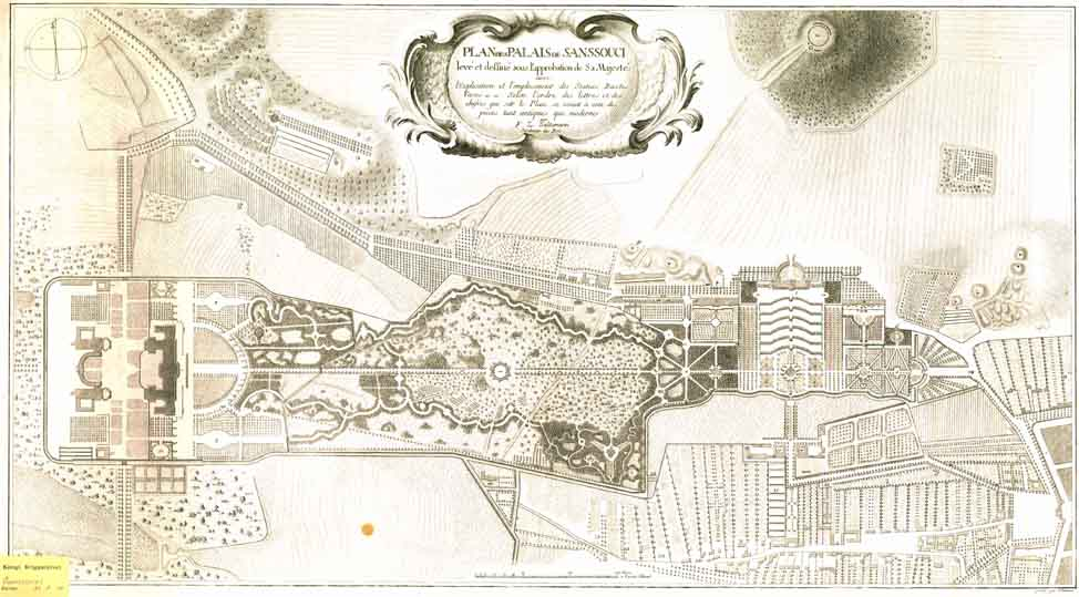 plan du palais de Sanssouci, Potsdam du vivant de Frederic II de Prusse